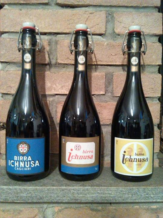 Riedizioni storiche, 75 cl.